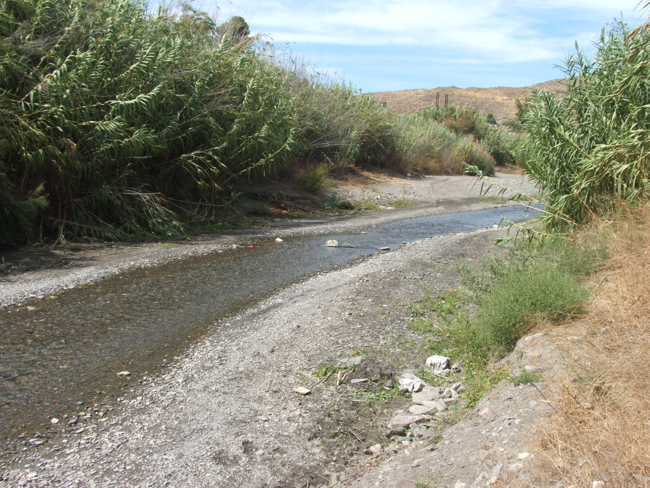 Río Nacimiento, en Nacimiento, Almería (España).